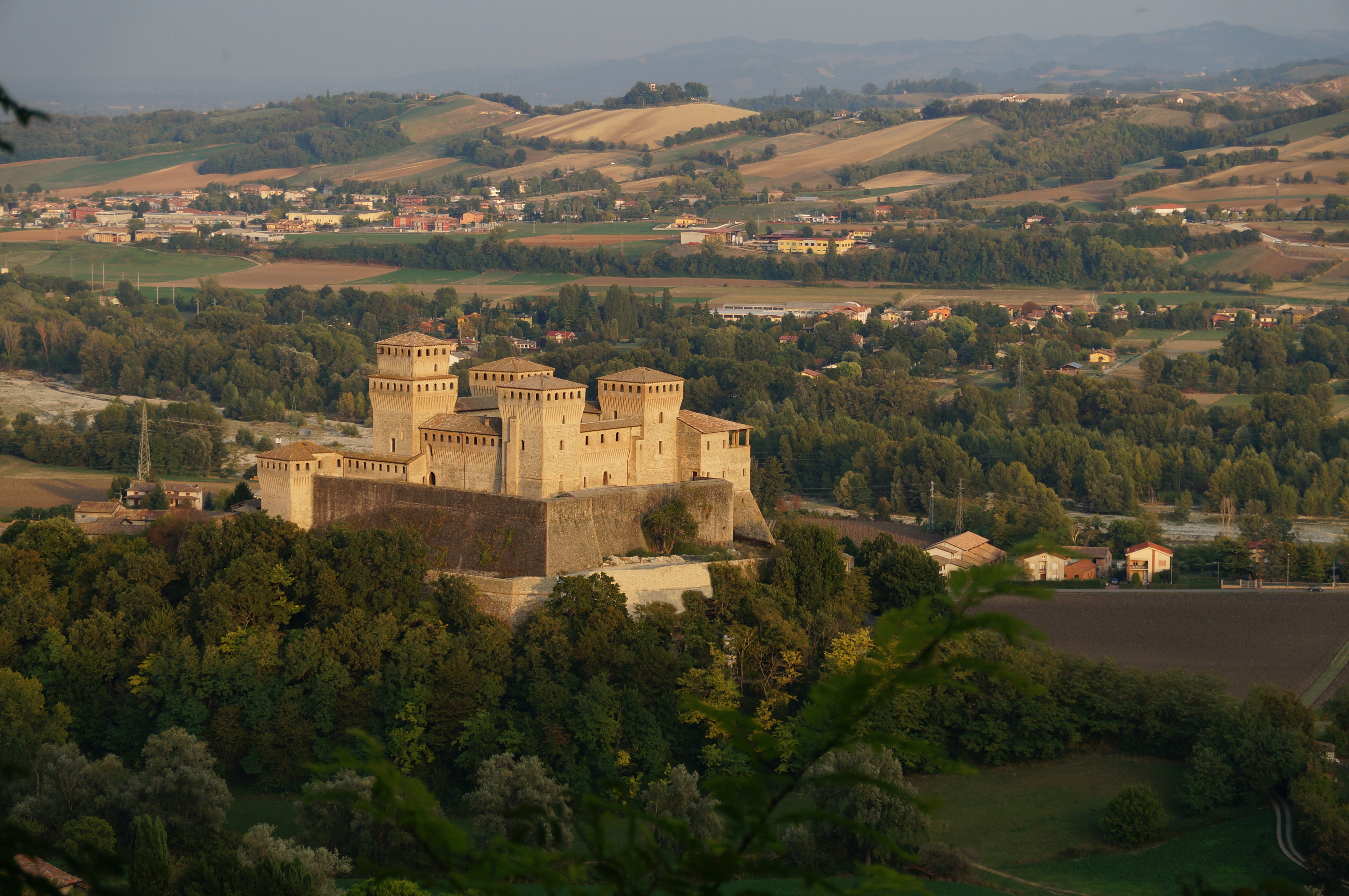 Castello di Torrechiara (esternamente il primo giro delle mura del castello, prima dell'entrata al portone d'ingresso) - MIBAC This is a photo of a monument which is part of cultural heritage of Italy.